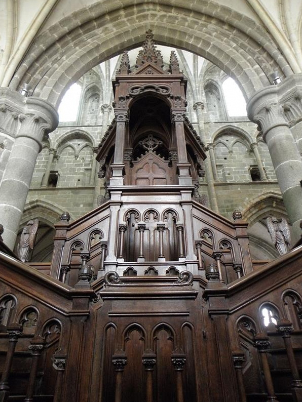 Revers de la chaire de la cathédrale Saint-Samson de Dol-de-Bretagne (35).